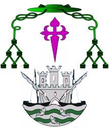 Brasão Eclesiástico da Diocese de Setúbal, contendo as armas da cidade de Setúbal, a cruz de Santiago e o Gallero episcopal de 6 borlas.